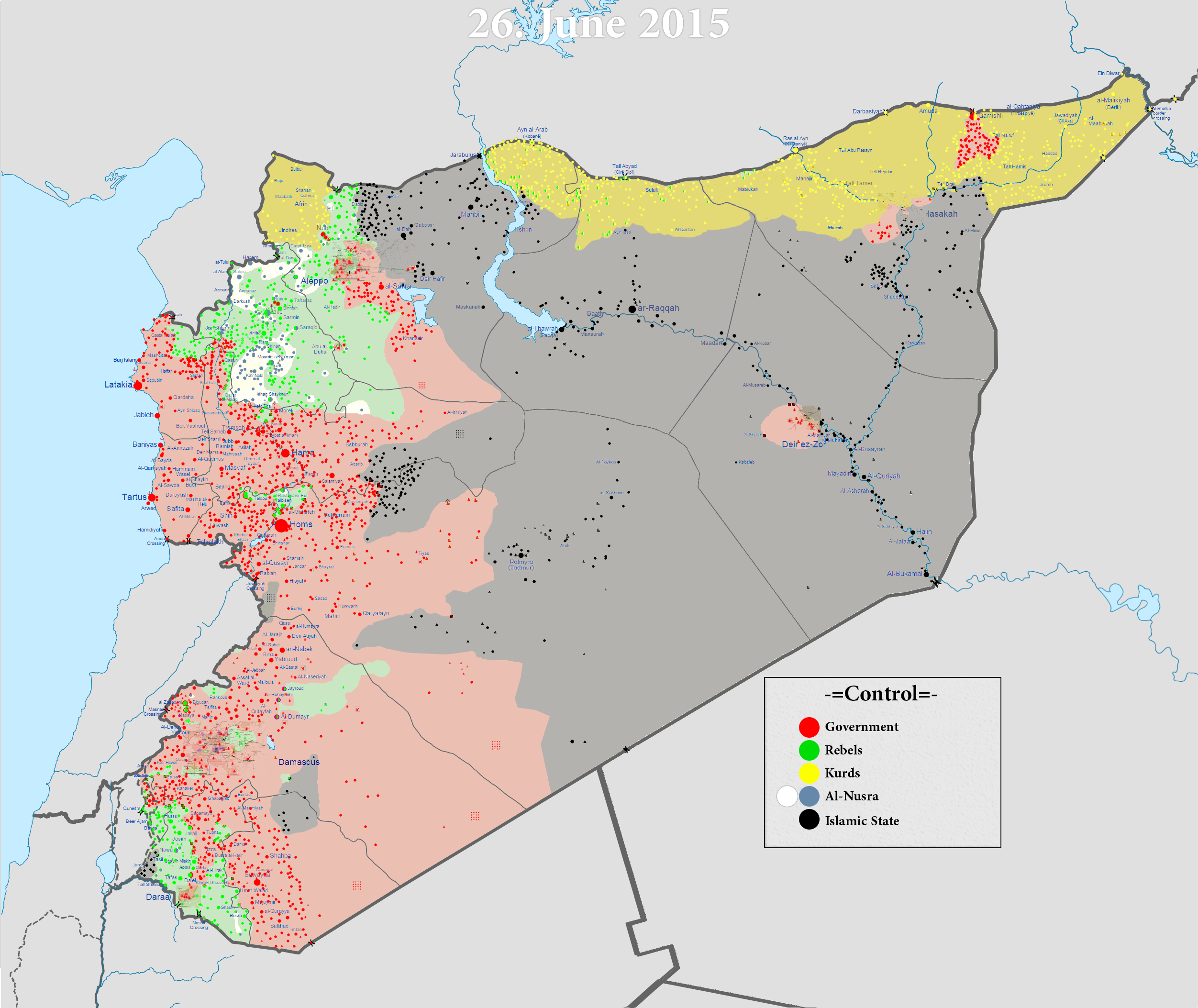 Guerre civile syrienne au 26 juin 2015